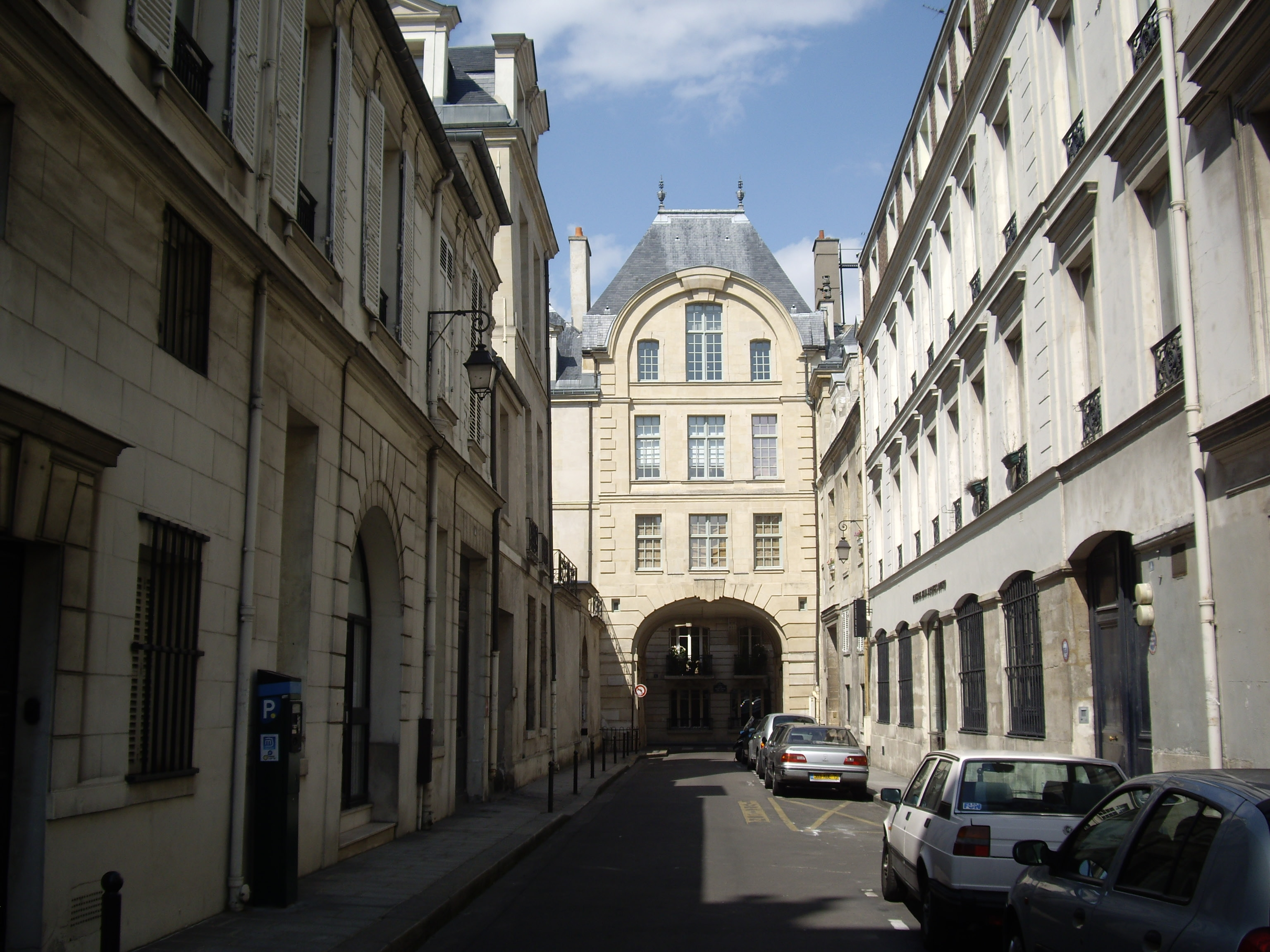 Rue de Bretonvilliers, Paris 4e. Vue depuis le quai de Béthune, vers la rue Saint-Louis-en-l'Île. Au fond, le pavillon de l'ancien hôtel de Bretonvilliers.